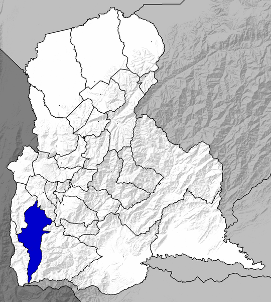 Municipio Junín - Táchira